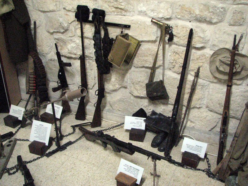 אוסף הנשקים, במוזיאון "חומה ומגדל" שבקיבוץ חניתה רישיון נוצר על ידי משתמש:Andrei